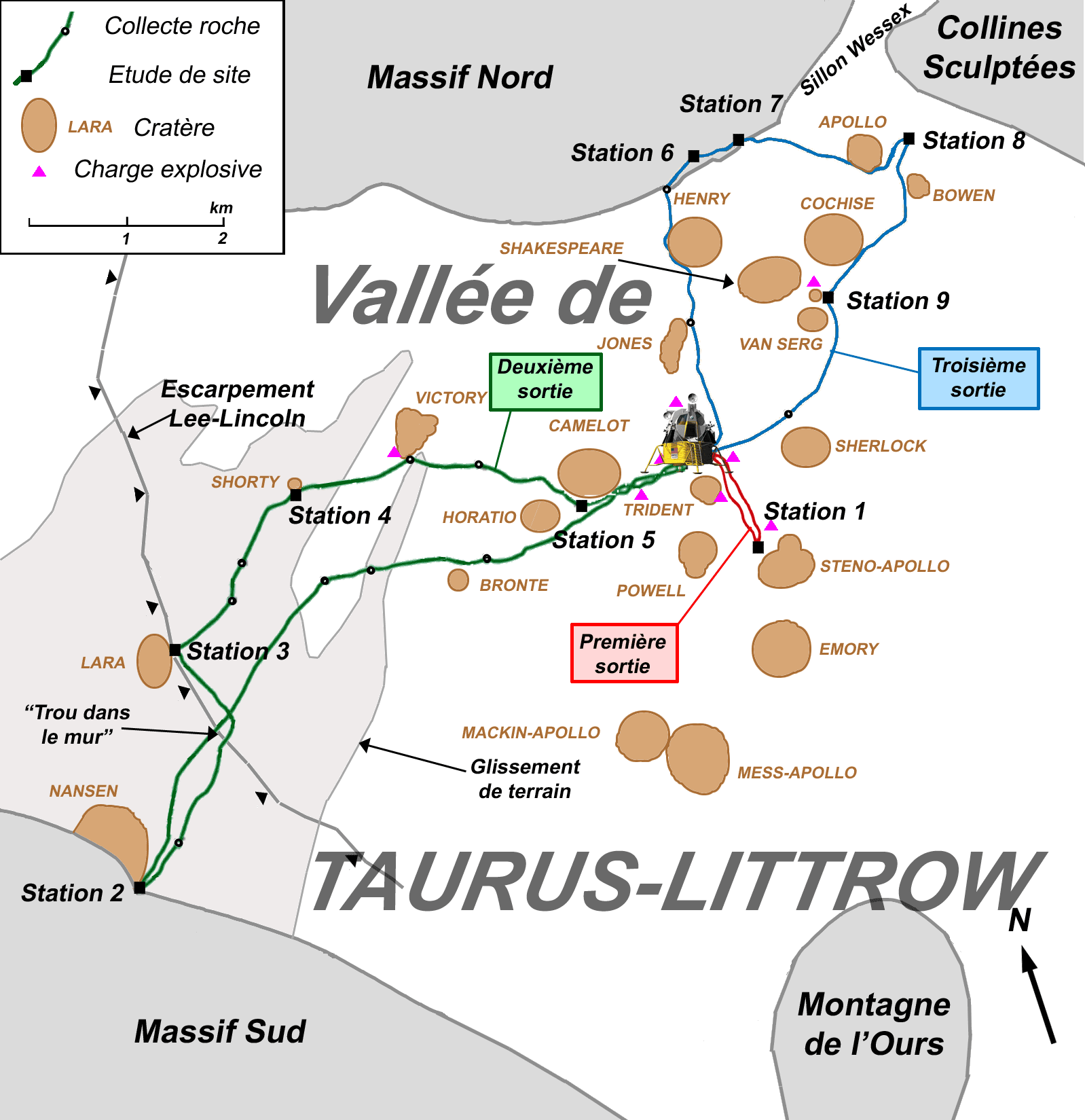 Trajet des sorties extravéhiculaires sur le sol lunaire de l'équipage d'Apollo 17. Légendes en francais